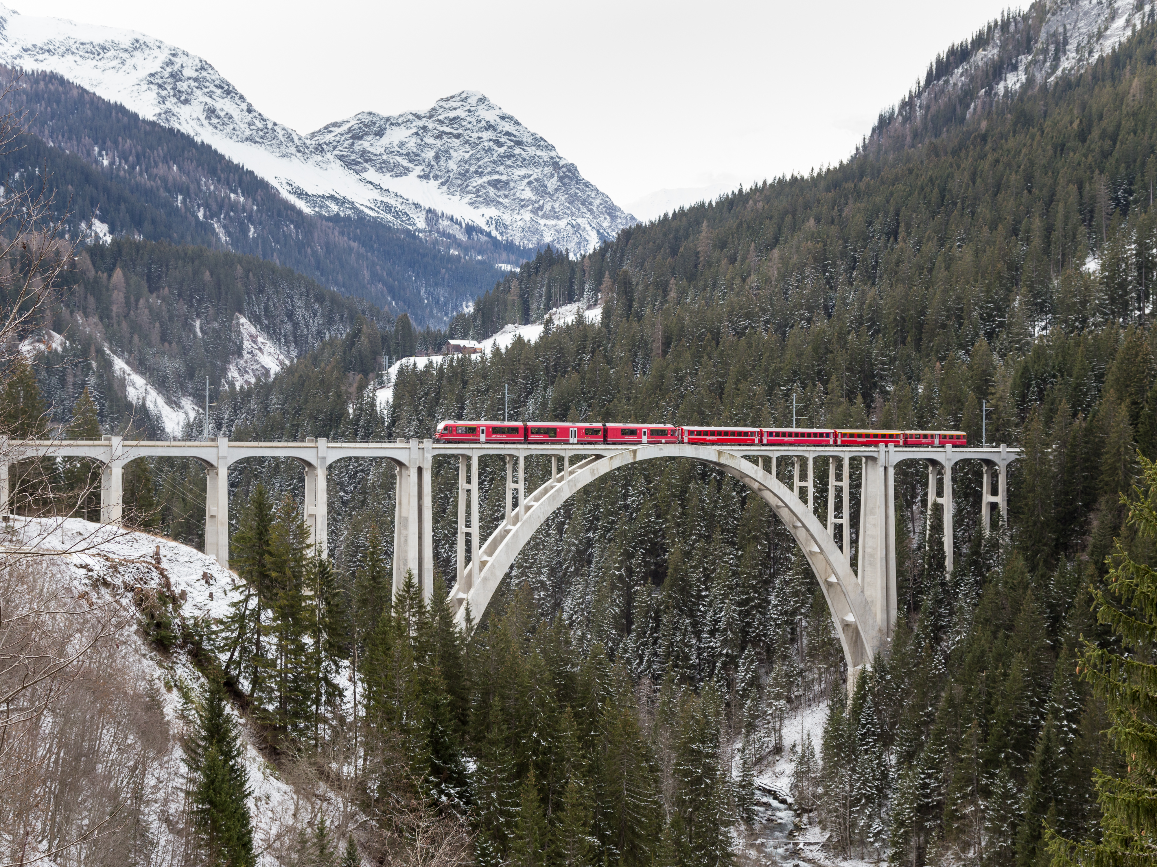 Langwieser Viadukt der Arosabahn